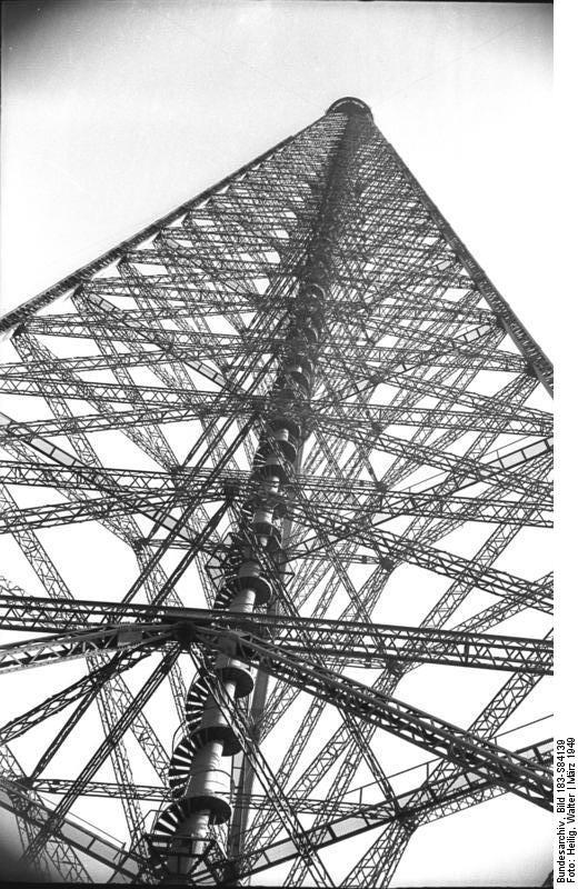 Die Stimme Berlins wieder auf voller Lautstärke. (Die neue Sendeanlage des Berliner Rundfunks in Königs Wusterhausen) Die barbarische Sprengung der Sendeanlage des Berliner Rundfunks durch die französische Militärbehörde am 20. Dezember 1948 sollte die Stimme der Wahrheit zum Verstummen bringen. Doch in engster Zusammenarbeit der technischen Intelligenz mit der Arbeiterschaft konnte die Sendeanlage in einer Rekordzeit von 2 1/2 Monaten in Königs Wusterhausen neu errichtet werden. Seit dem 20.3.49 sendet der Berliner Rundfunk wieder mit voller Lautstärke. UBz: Der 240 m hohe Zentralmast, der die Antenne trägt. Aufn.: Illus/Heilig 2984-49 24.3.49